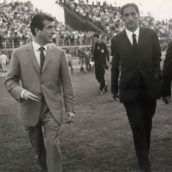 Andrea Arrica e Manlio Scopigno ai tempi del Cagliari dello Scudetto (1969-1970)